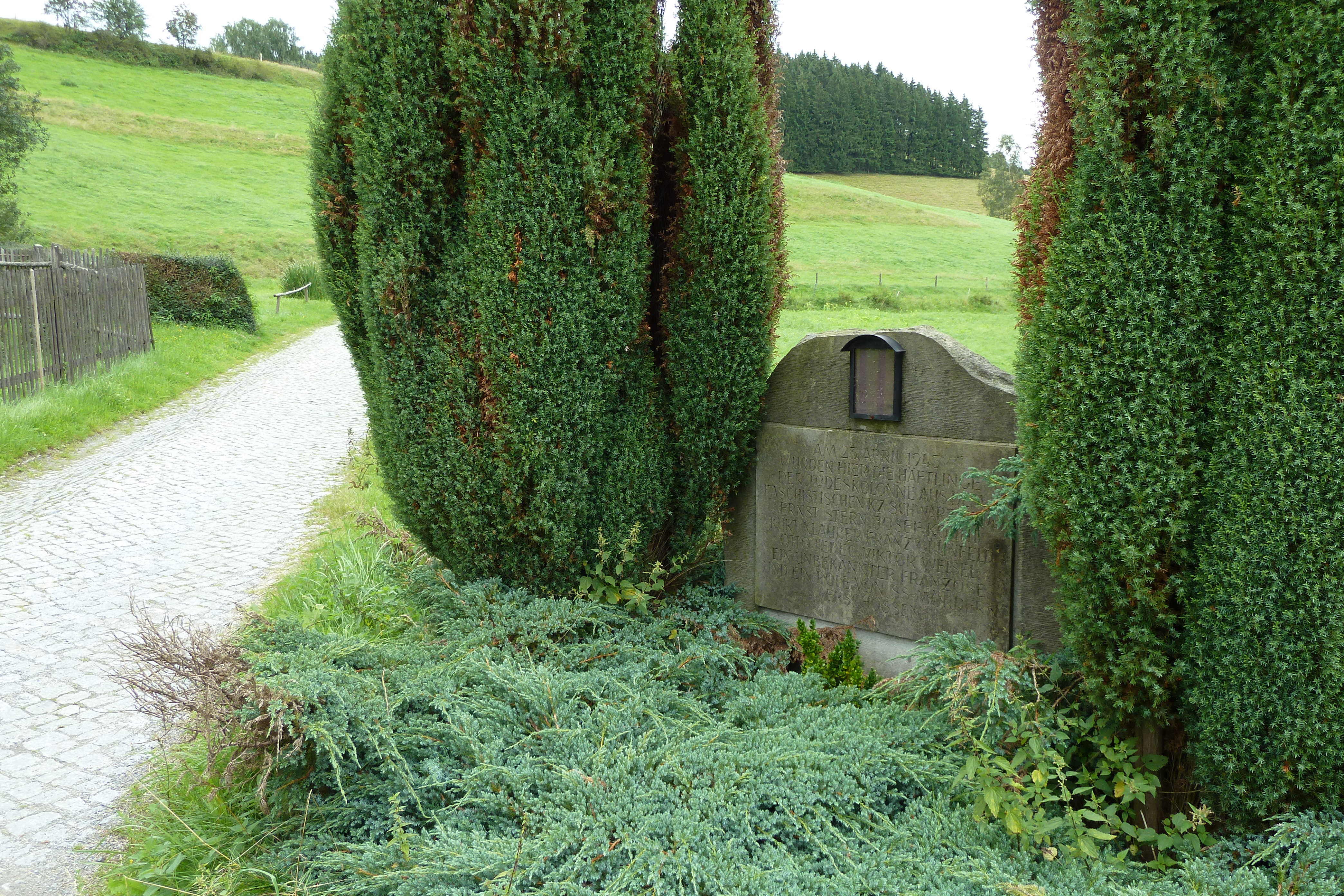 Gedenkstein nahe der Röllingmühle (Elbsandsteingebirge) für die Todesopfer des Todesmarsches des KZ Schwarzheide.